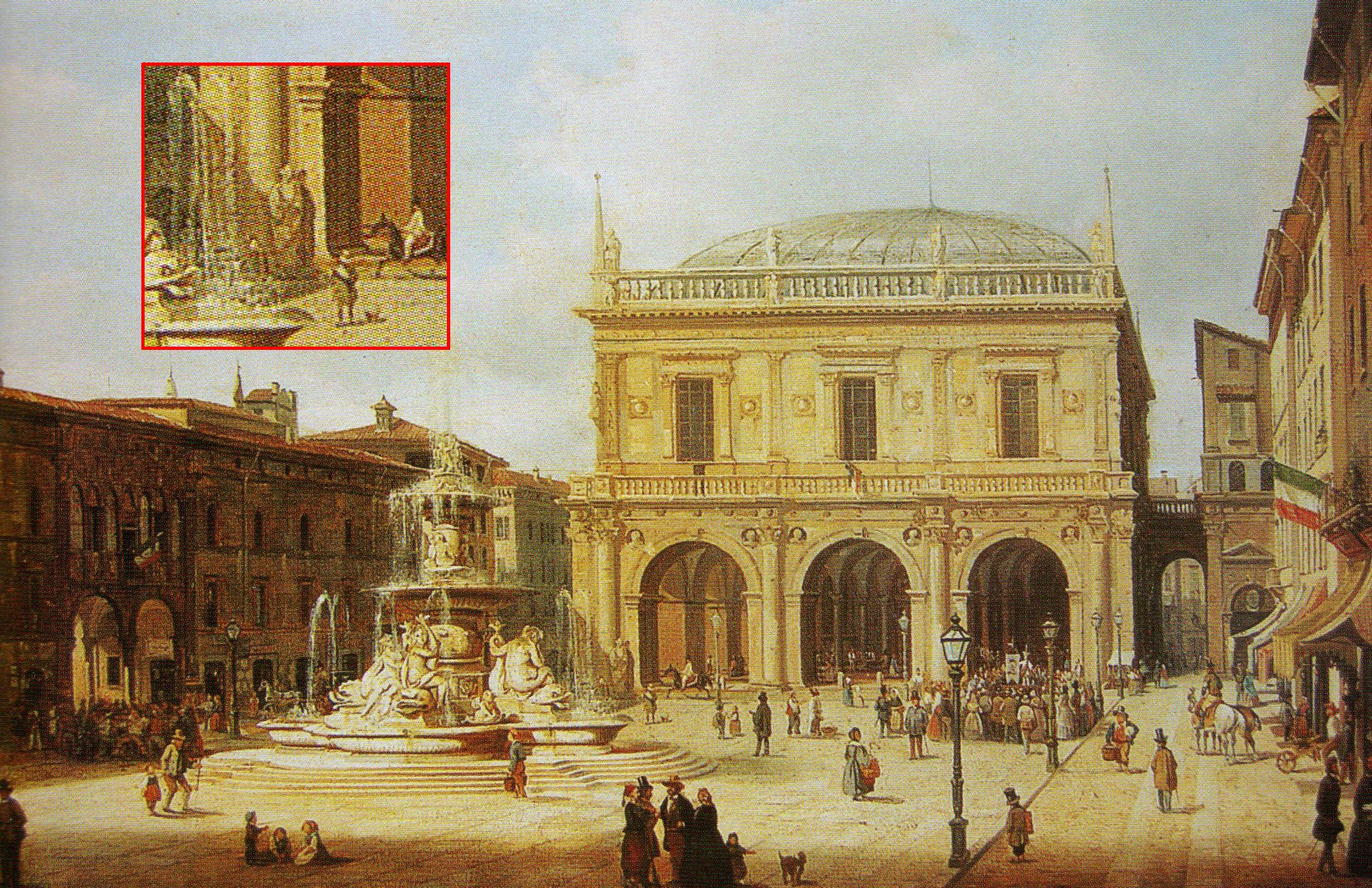 lodovica della loggia2.jpg